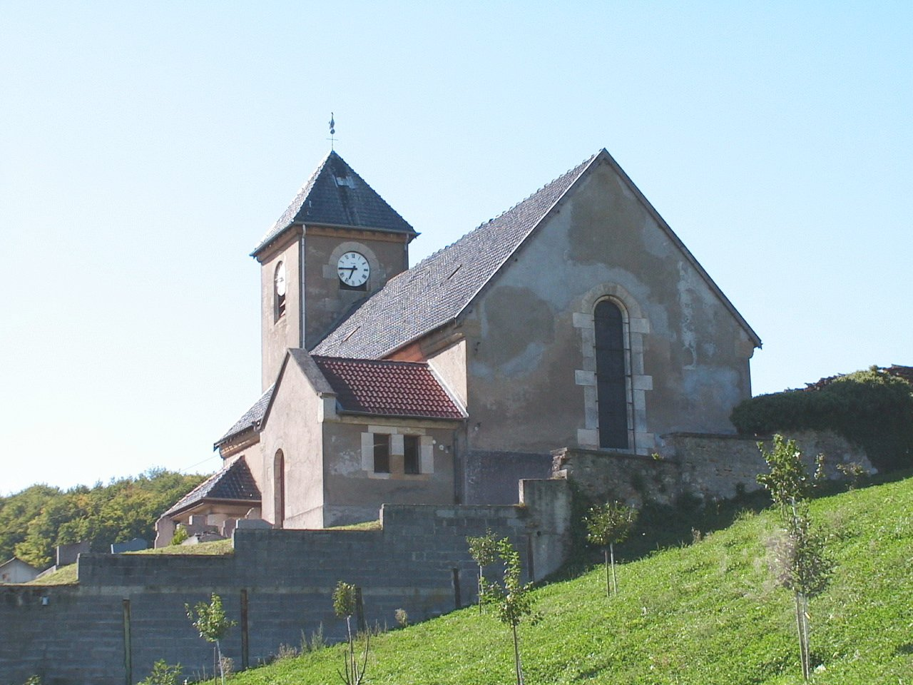 Eglise de Flabas, commune de Moirey-Flabas-Crépion. Photo prise en automne 2005 par F5ZV Licensing Catégorie:Image de commune de la Meuse